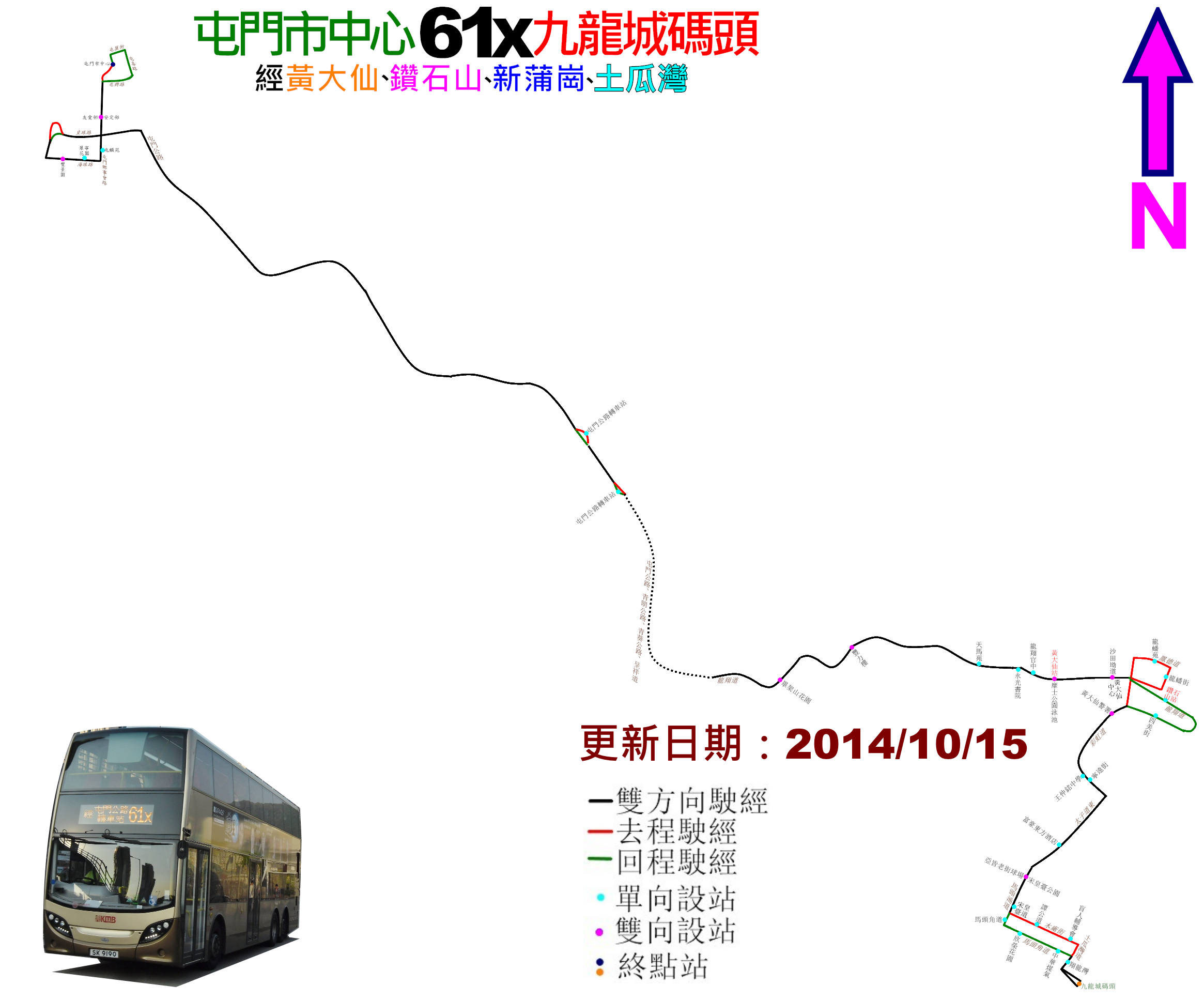 中文（香港）: 九巴61X線的走線圖